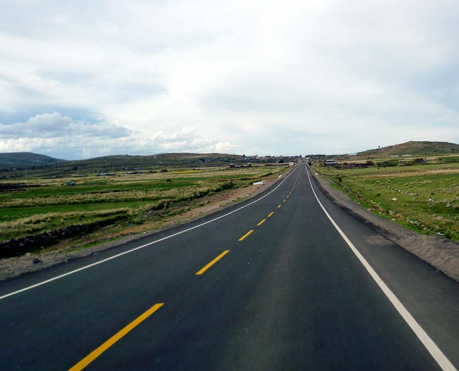 Otro tramo de la autopista Juliaca - Puno